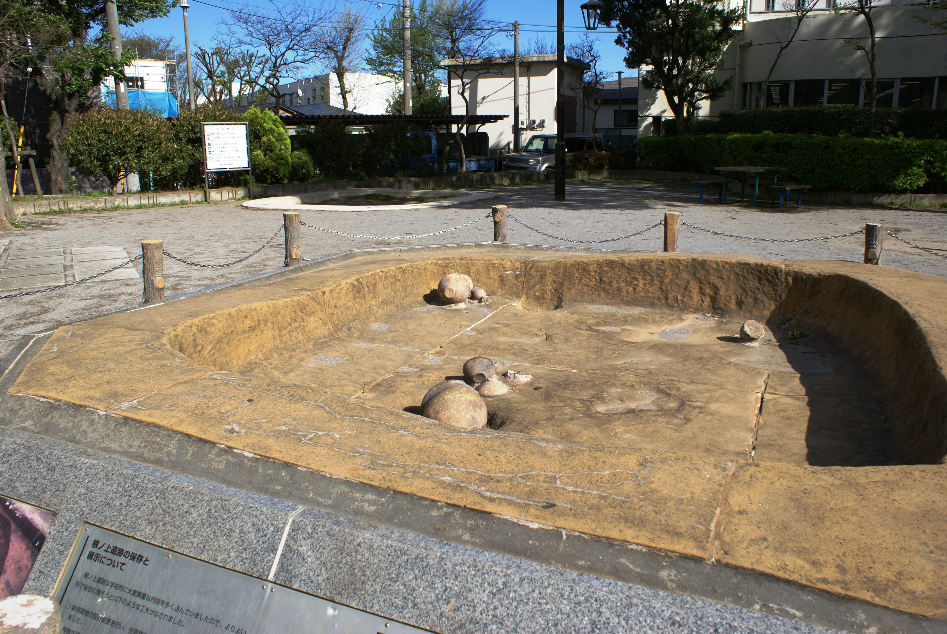 小茂根根ノ上遺跡